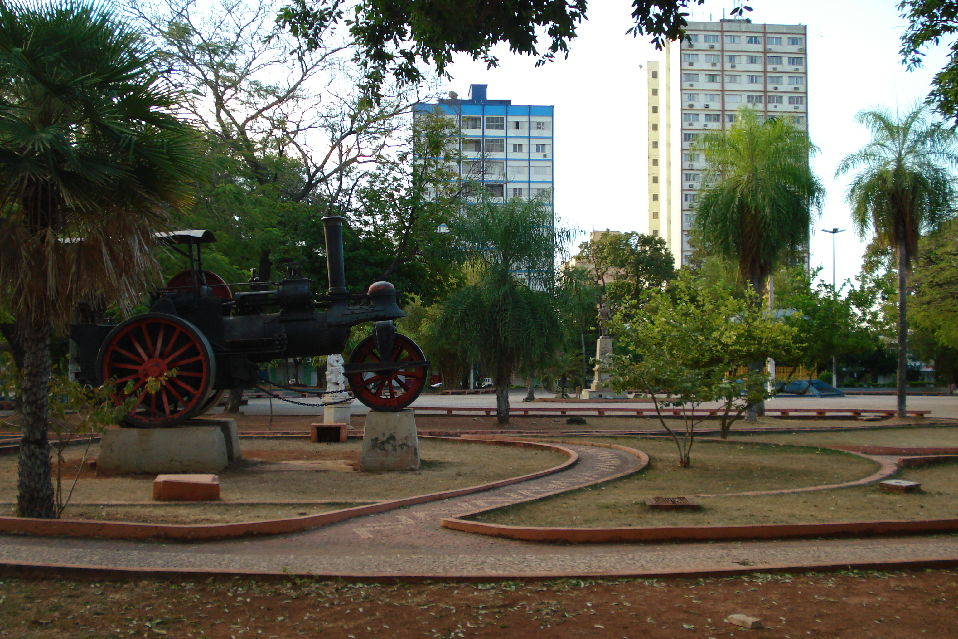 Vista do Centro através do Jardim da Independencia